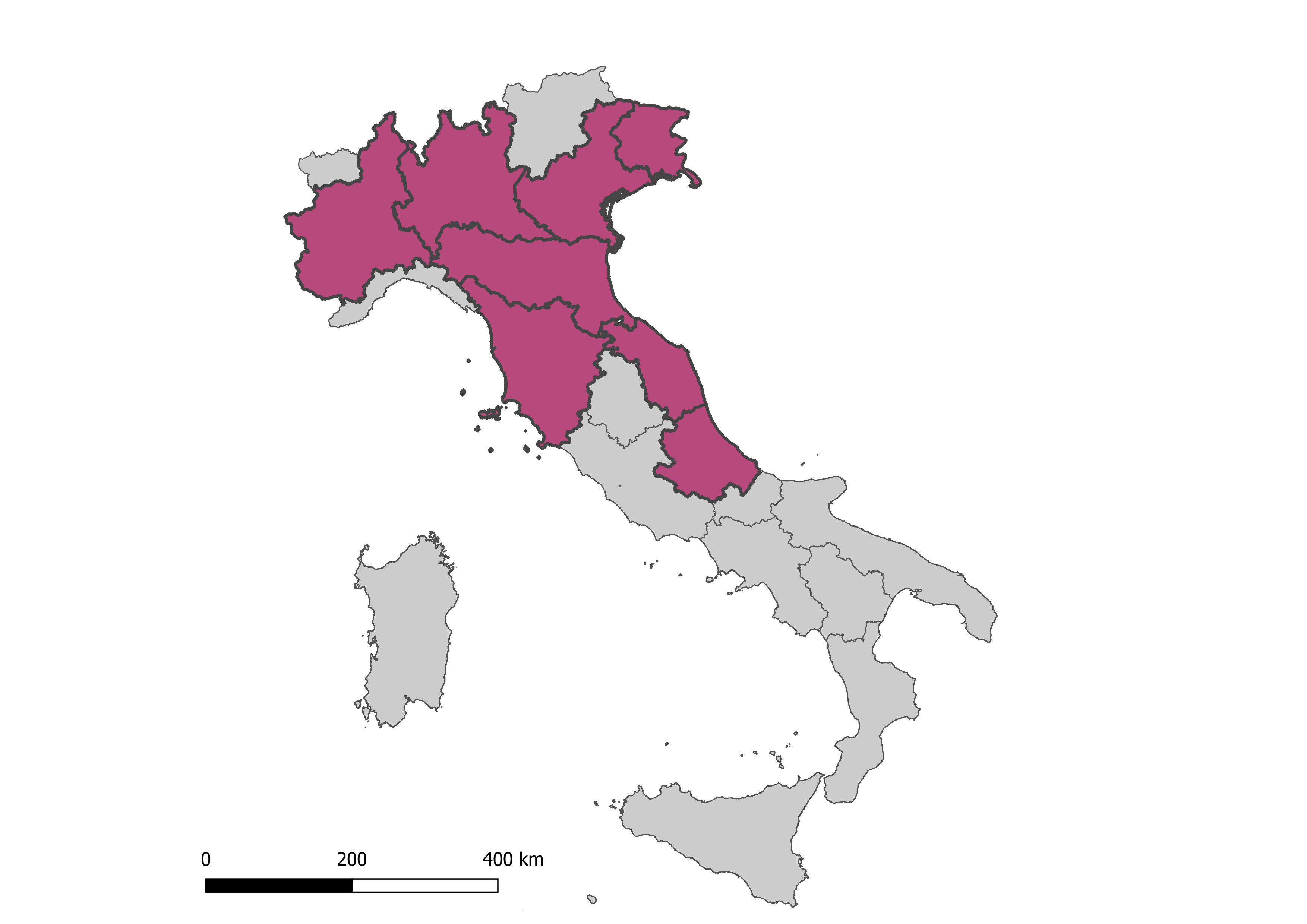 Situovanost regionu "Třetí Itálie"